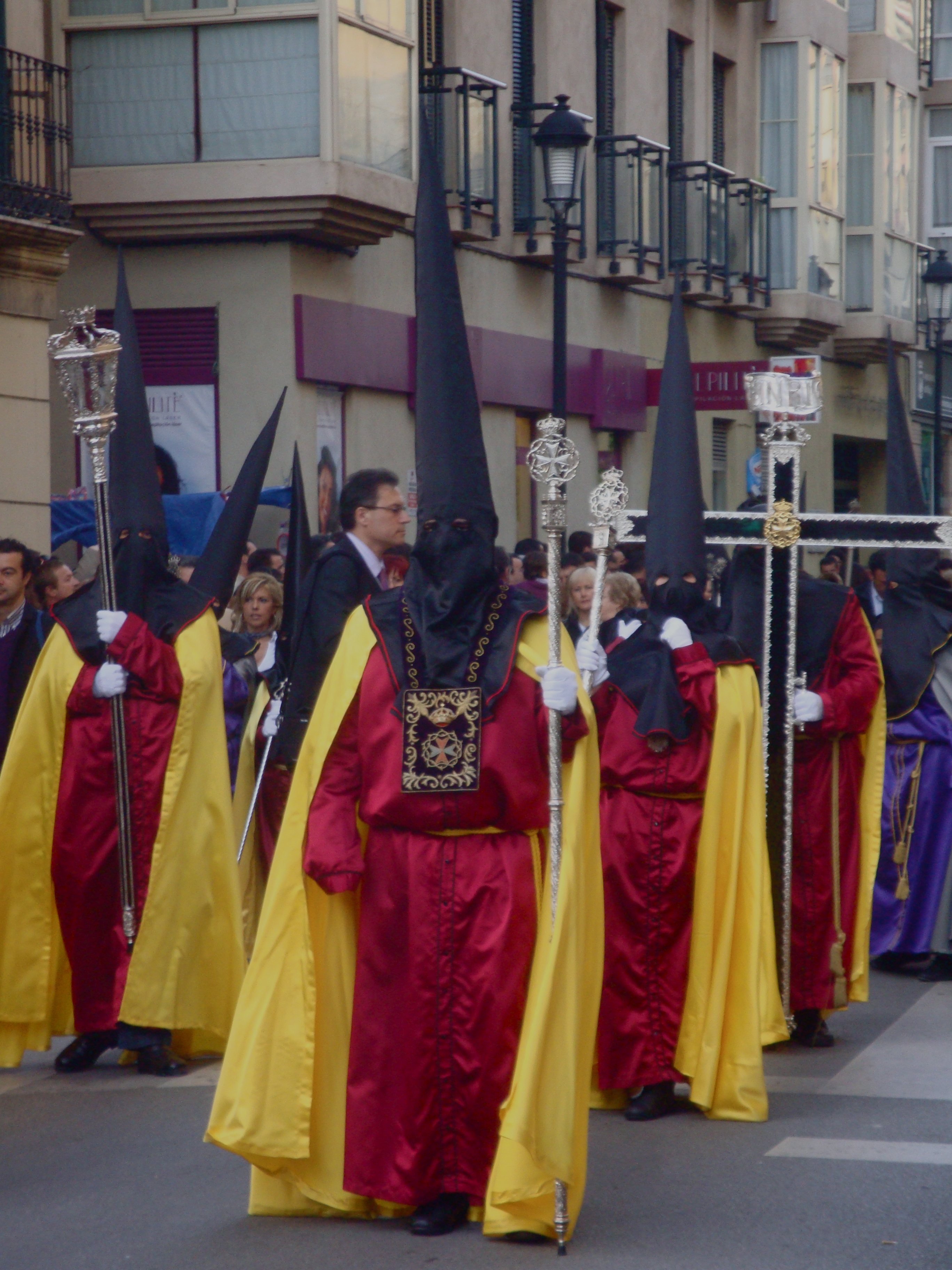 2010 Holy Week in Málaga